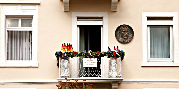 Hier im ehemaligen Hotel Sommer, der heutigen Rehabilitationsklinik Park-Therme, in Badenweiler starb am 15. Juli 1904 der russische Schriftsteller und Dramatiker Anton Pawlowitsch Tschechow.